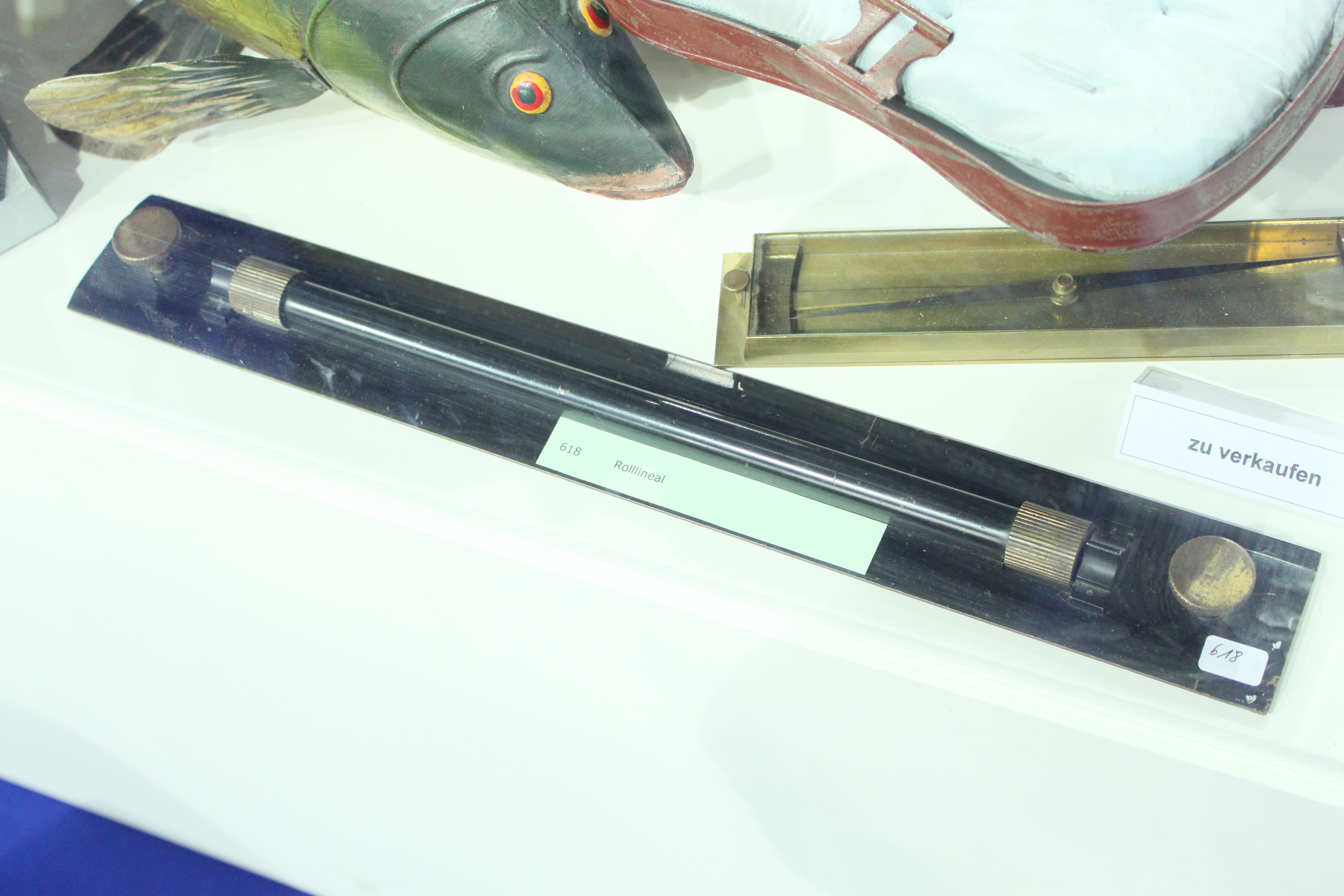 Rolllineal; engl. Rolling ruler , gesehen auf der Messe Bremen "Boatfit 2011"